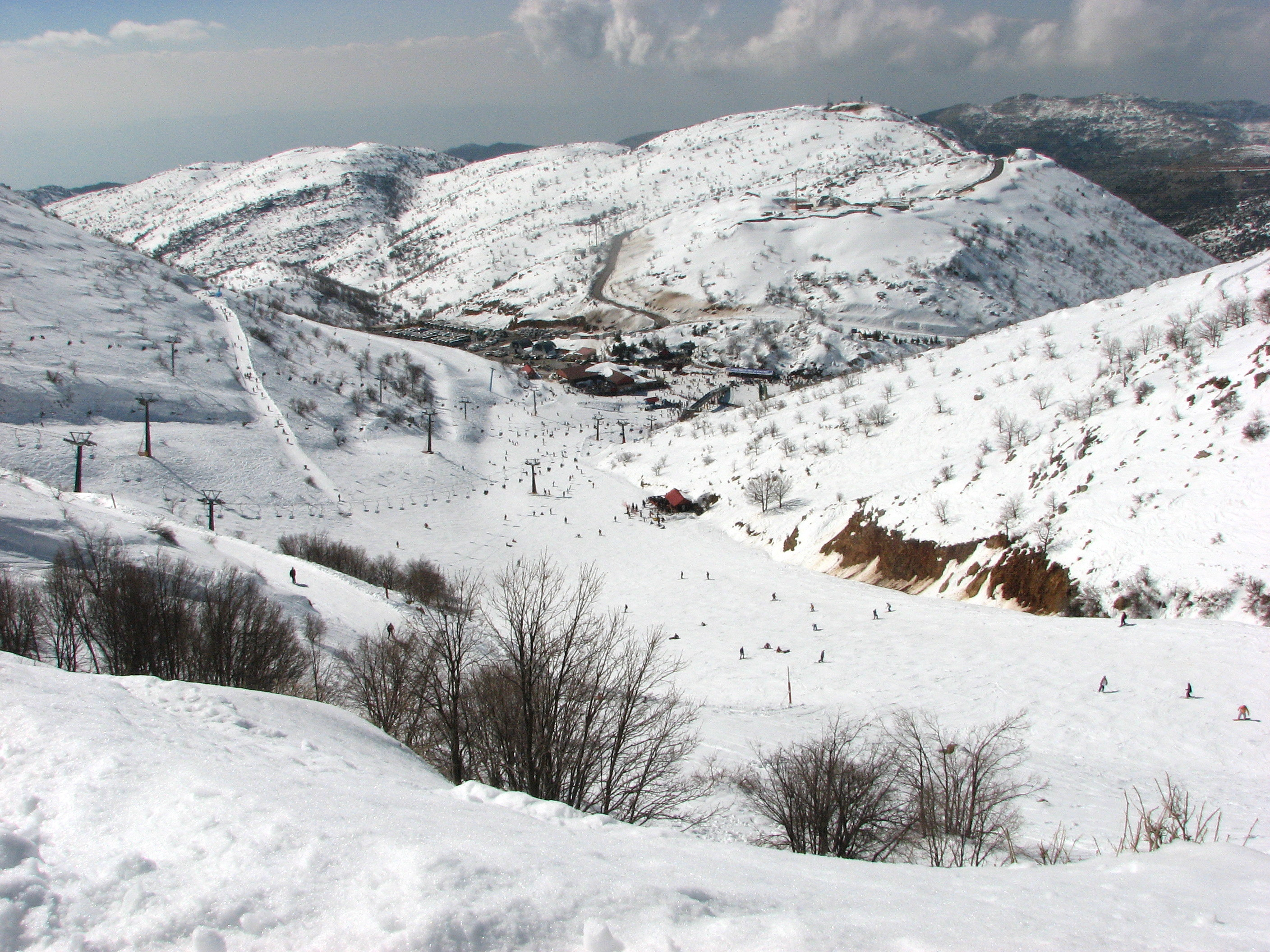 Mount Hermon ski site, Israel